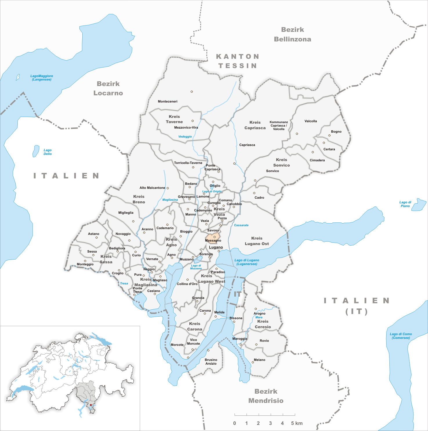 Municipality Massagno